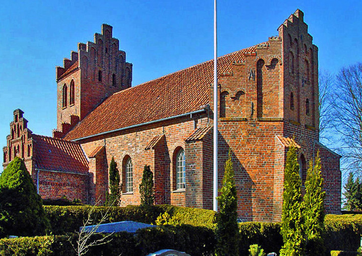 fra sydøst